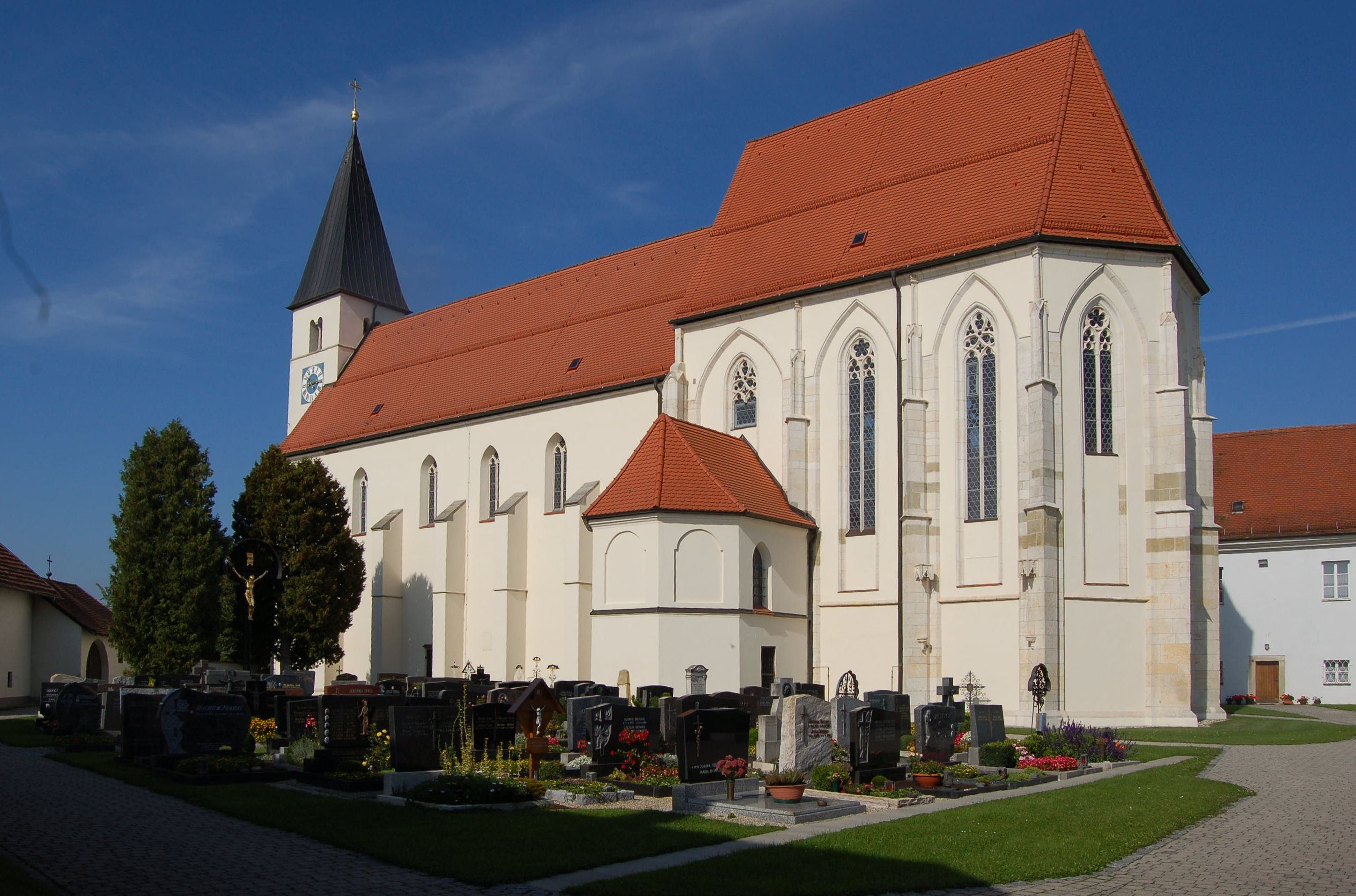 Ansicht der Wallfahrtskirche Sossau, in der Umgebung von Straubing. Aufnahme aus dem Innenhof der Kirche, im Vordergrund ein Teil des FriedhofesObject location48° 54′ 19.7″ N, 12° 33′ 42.85″ E